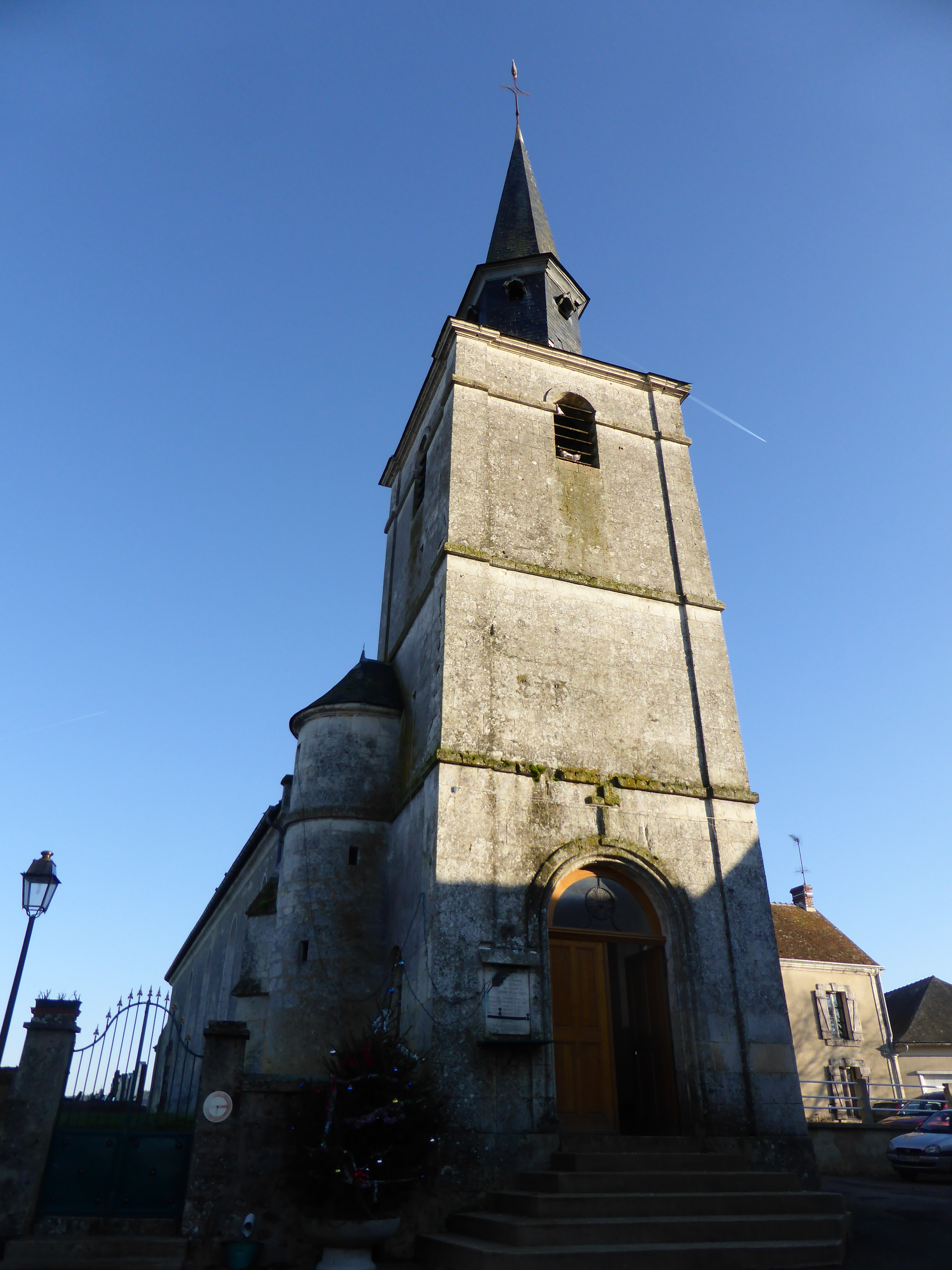 Église Saint-Ouen de Saint-Ouen-de-la-Cour, dans l'Orne.